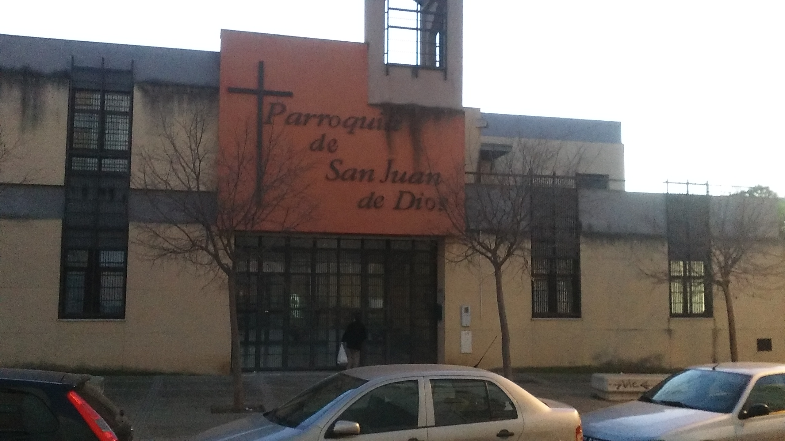 Parroquia San Juan de Dios - Jerez de la Frontera (España)